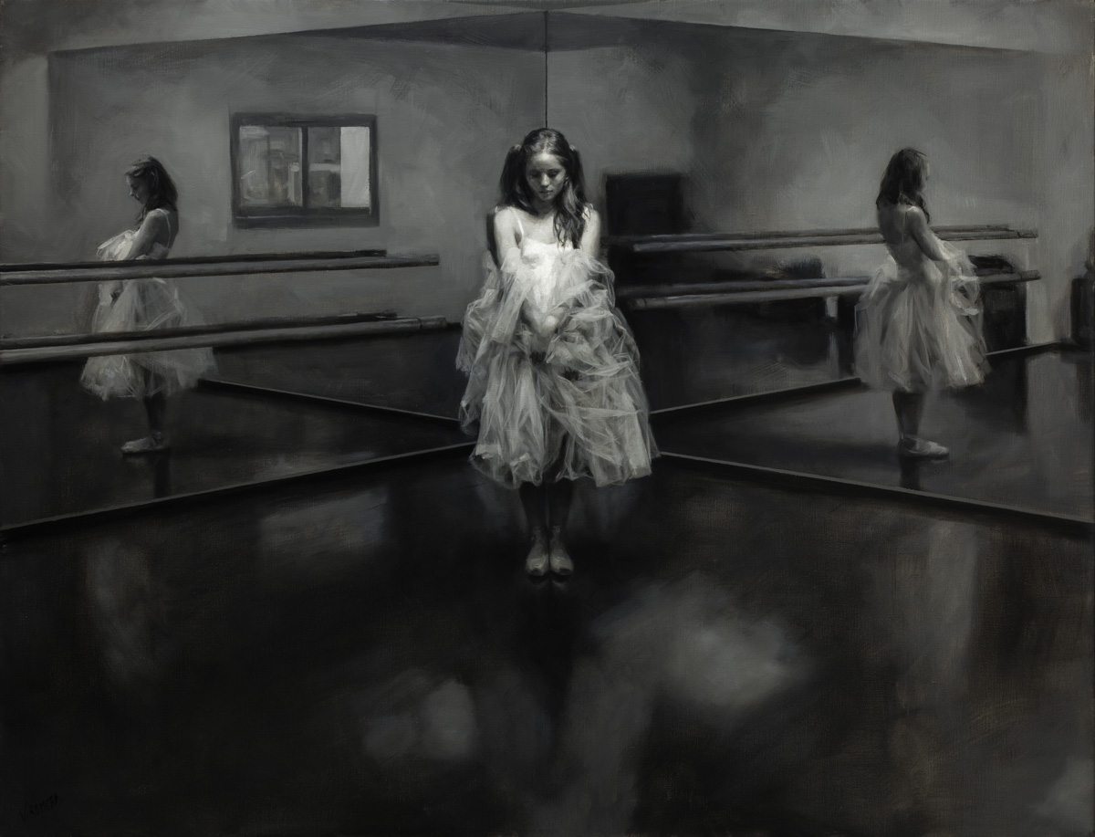 2014. Pastel 116x89 cm